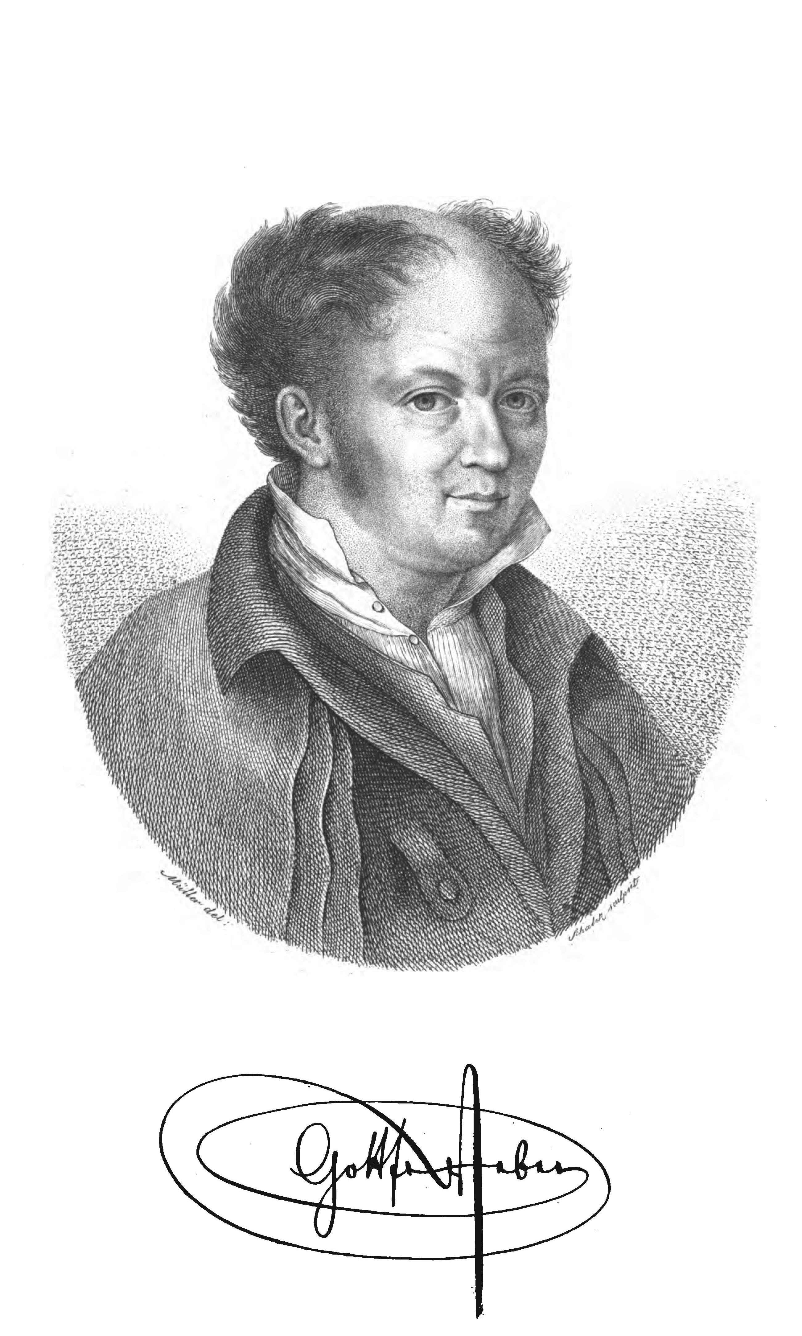 Gottfried Weber (1779–1839), deutscher Musiktheoretiker und Komponist: Frontispiz von Versuch einer geordneten Theorie der Tonsetzkunst, Band 1, Mainz 1824